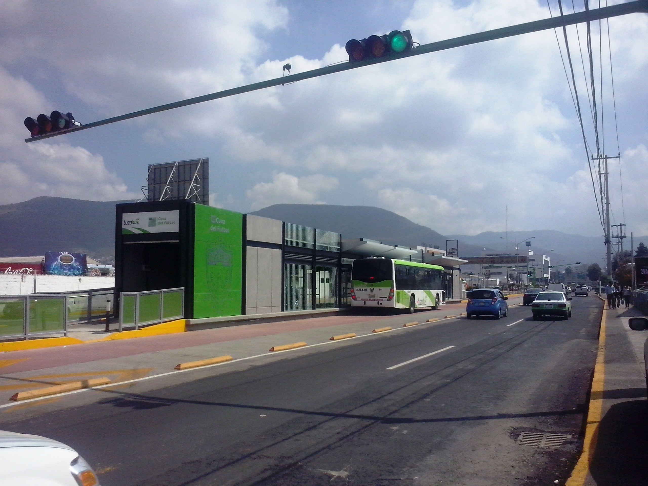 Estación Cuna del Fútbol (Poliforum) del Tuzobús.